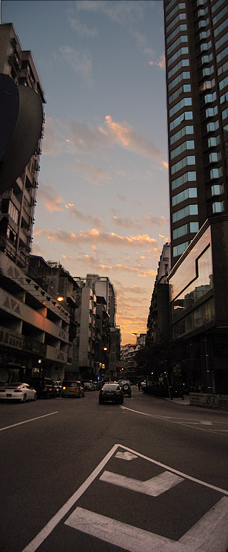 士多紐拜斯馬路。